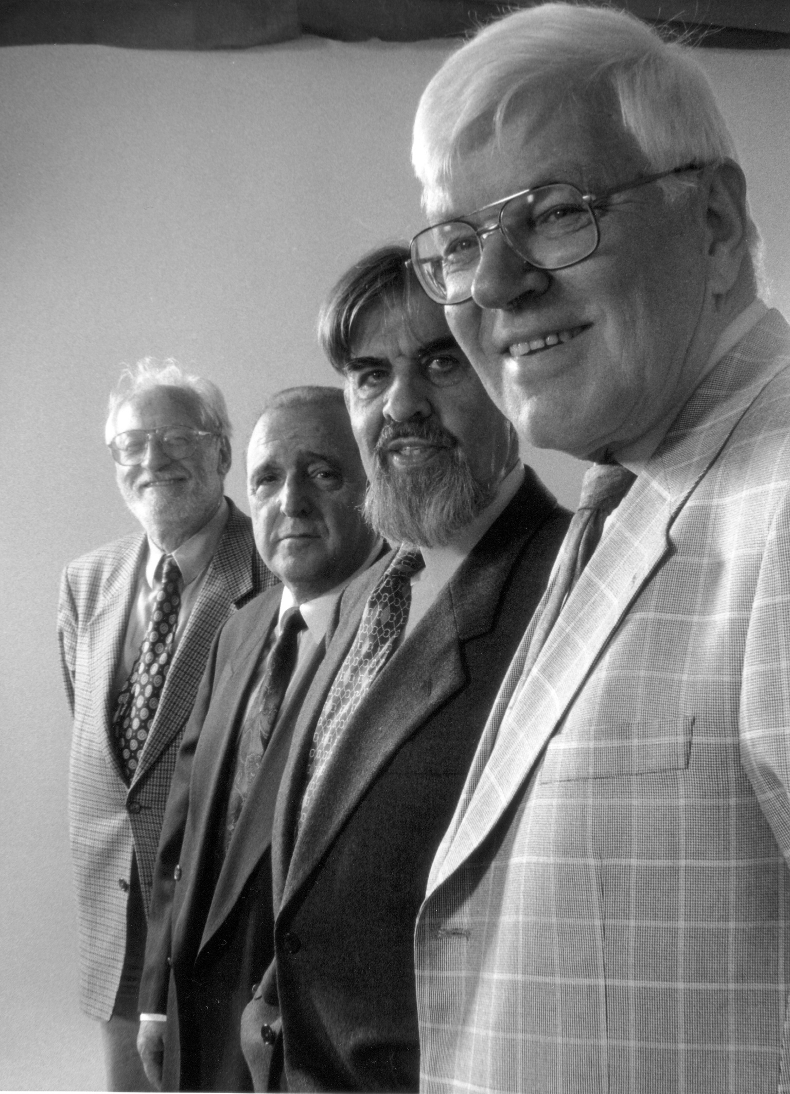 Četverica pesnikov, 1998